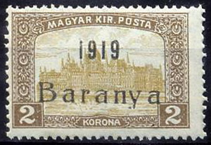 Почтовая марка Бараньи, 1919